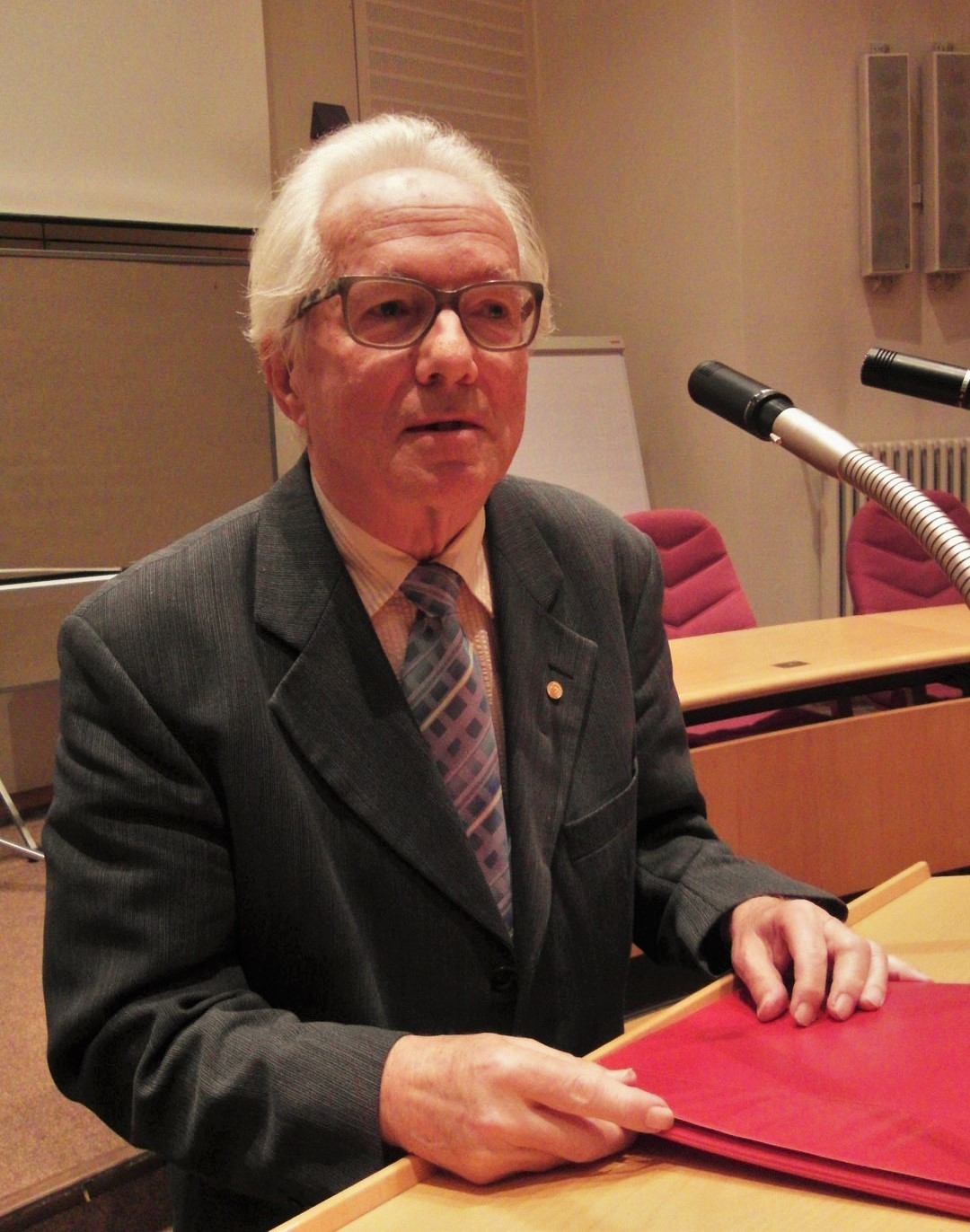 Bernhardt, Karl-Heinz (12.2015)